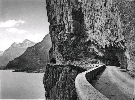 The Axenstrasse in Switzerland